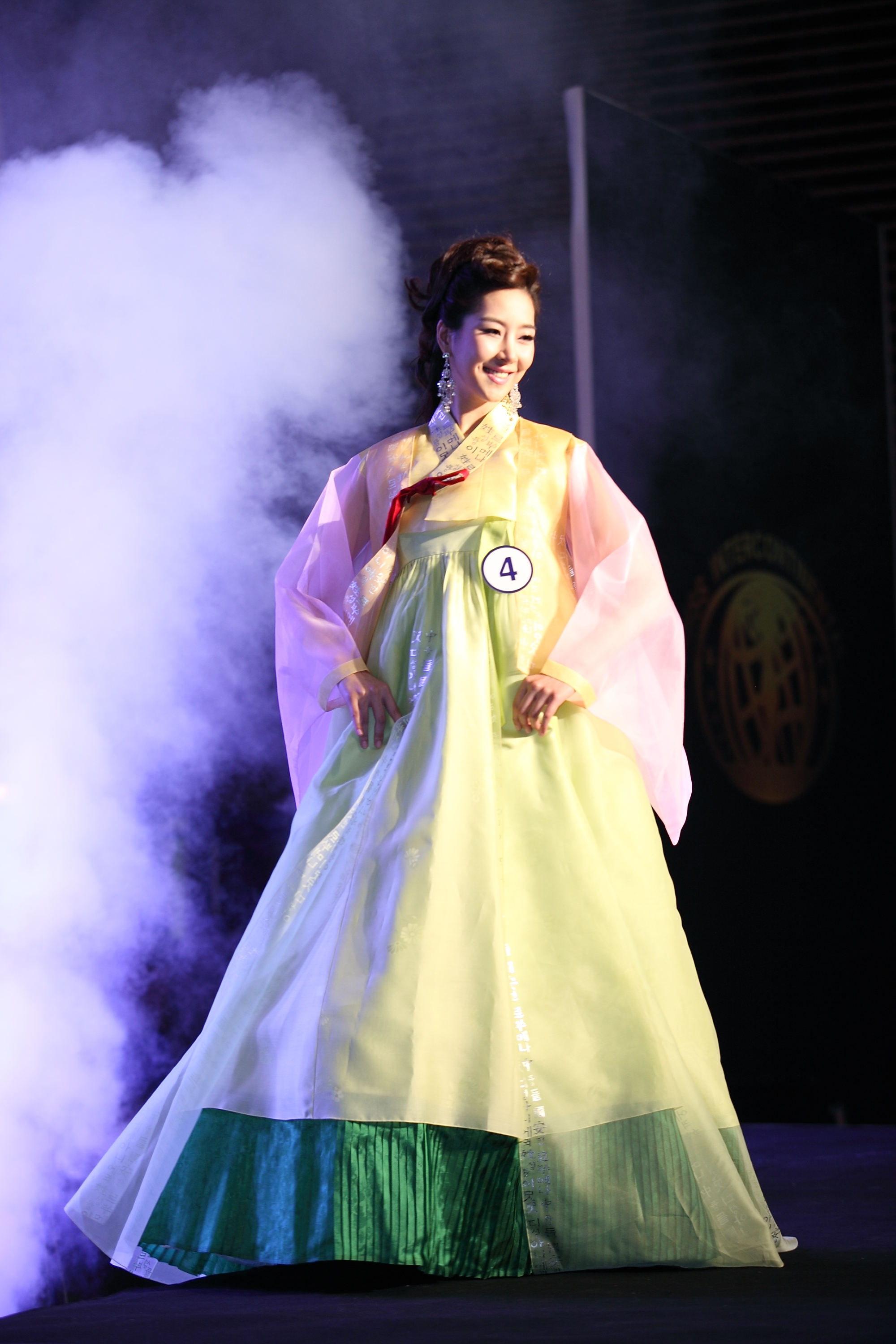 '2011 미스인터콘티넨탈 코리아' 대회에서 양예승